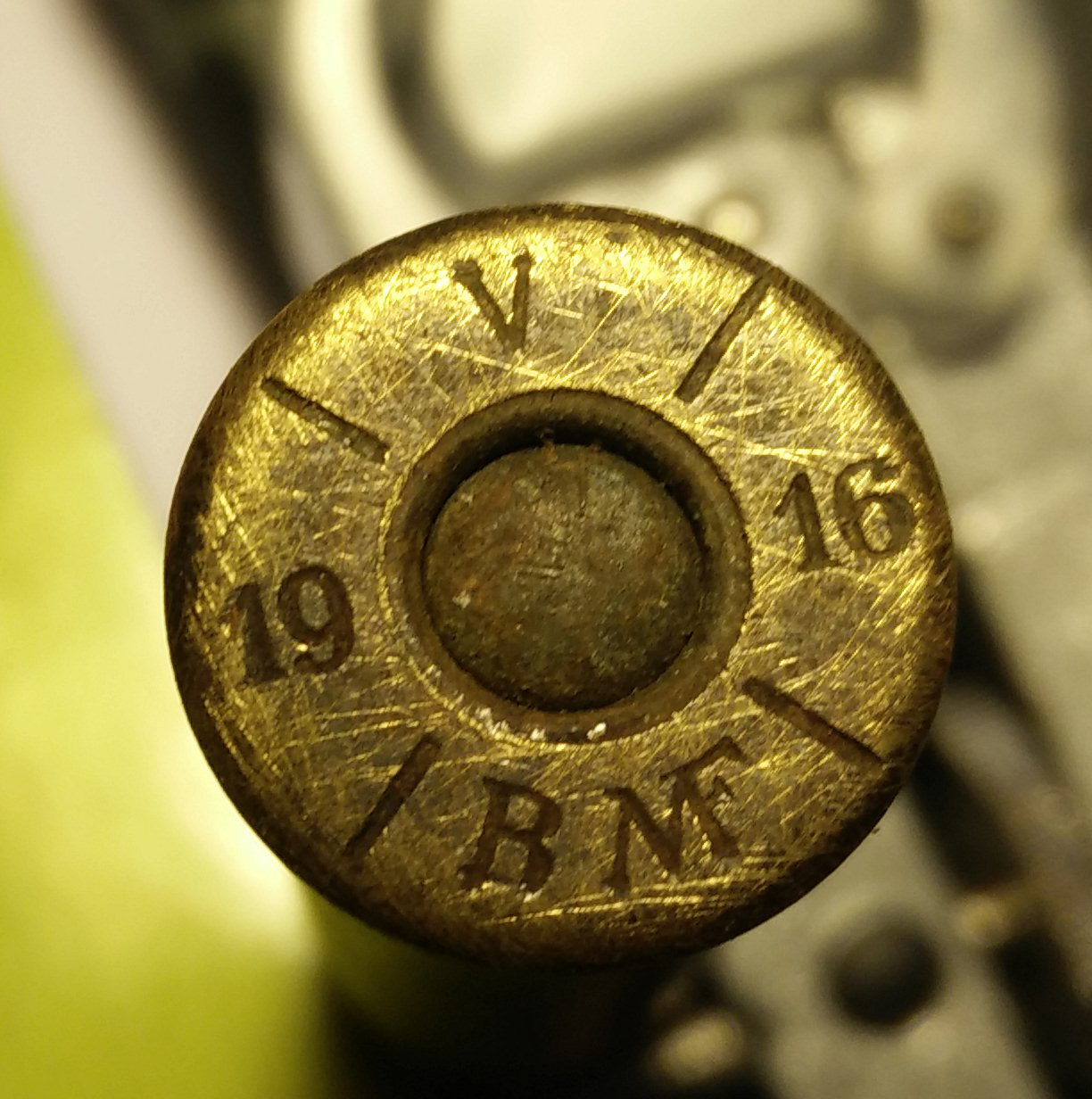 Oznake na dnu 8x50R naboja.